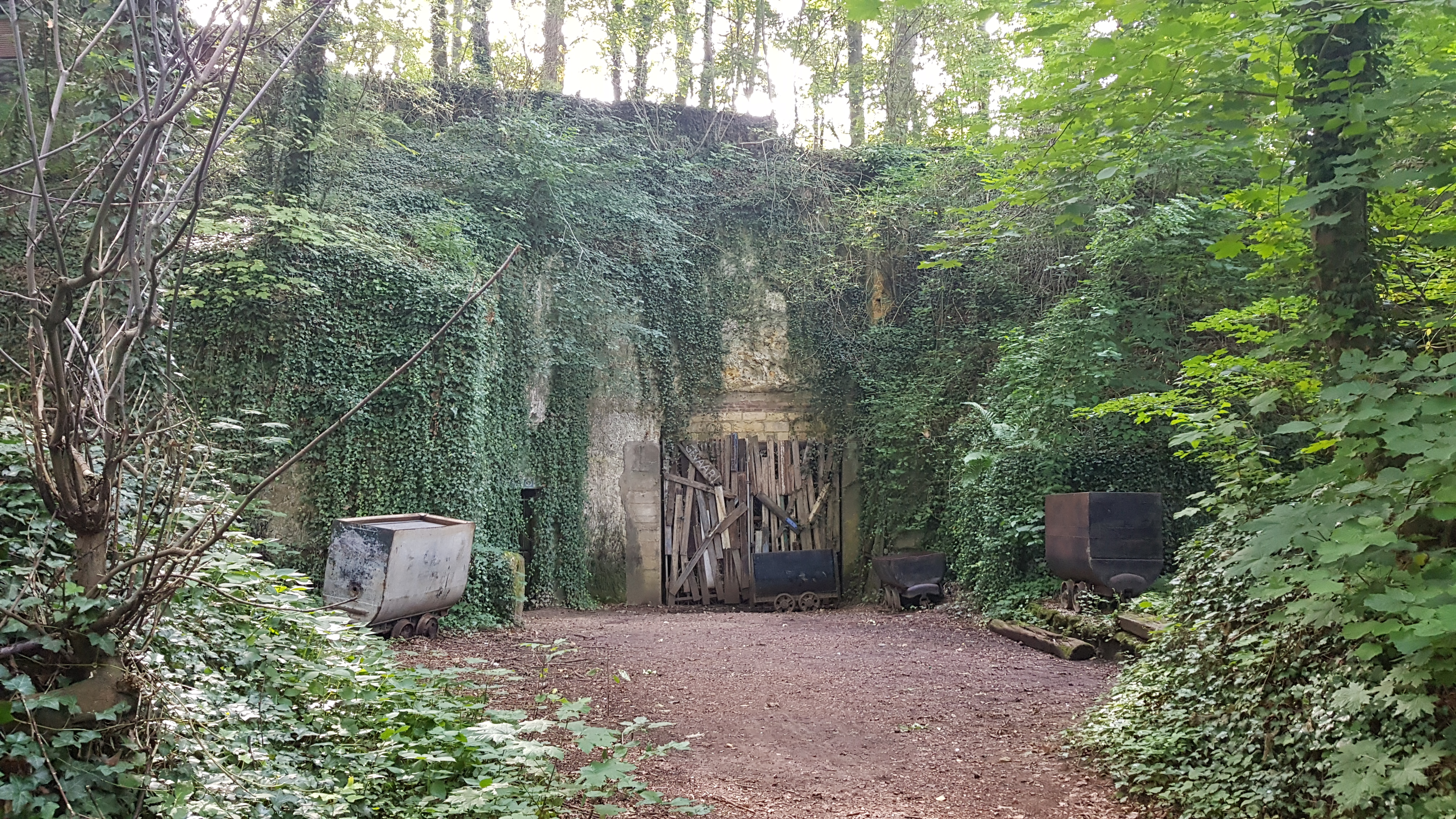 Roebroekgroeve, Valkenburg, Nederland